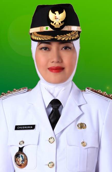 Potret Resmi Chusnunias Chalim sebagai Bupati Lampung Timur Periode 2016-2021